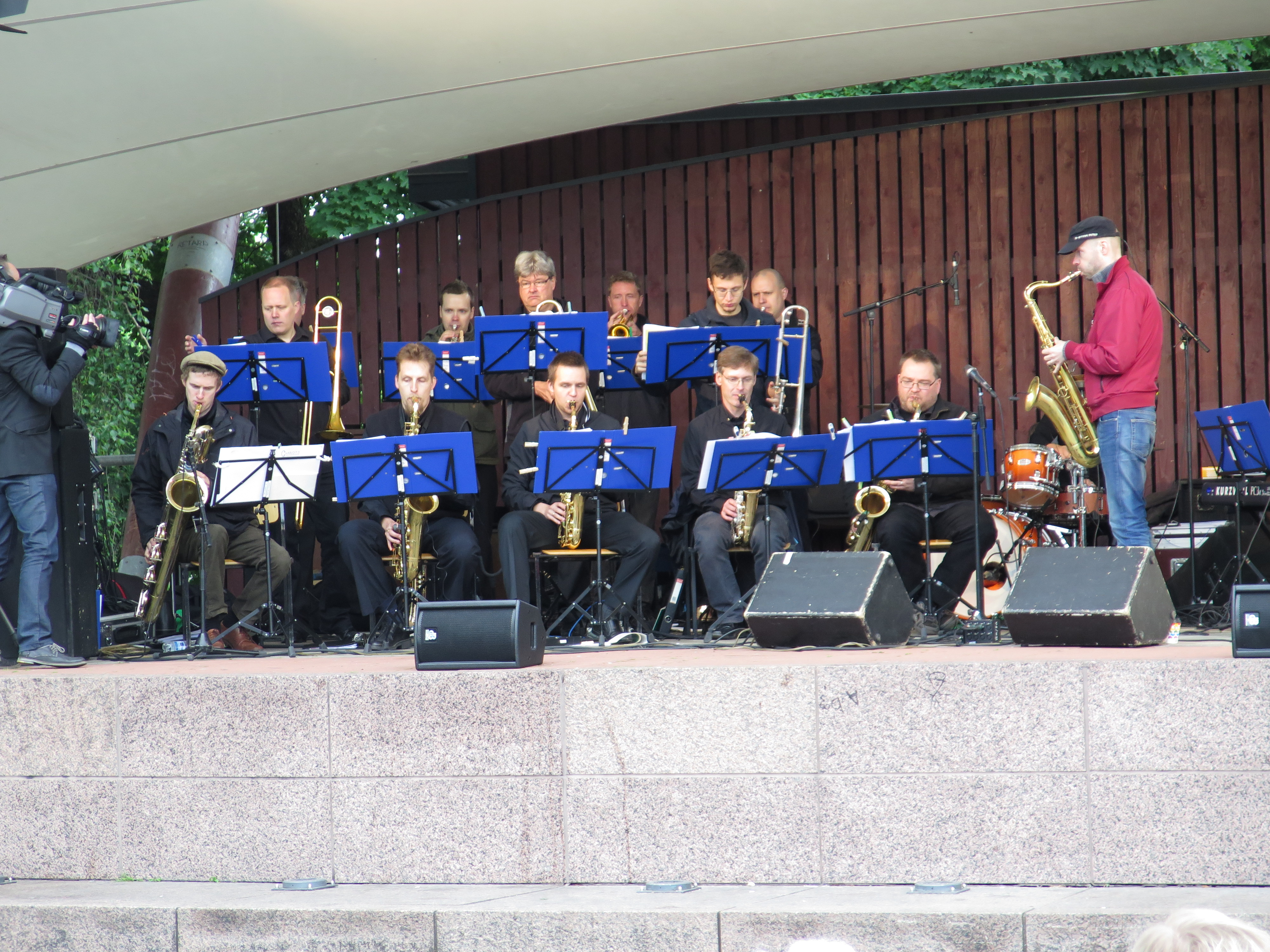 Chariots yhtye